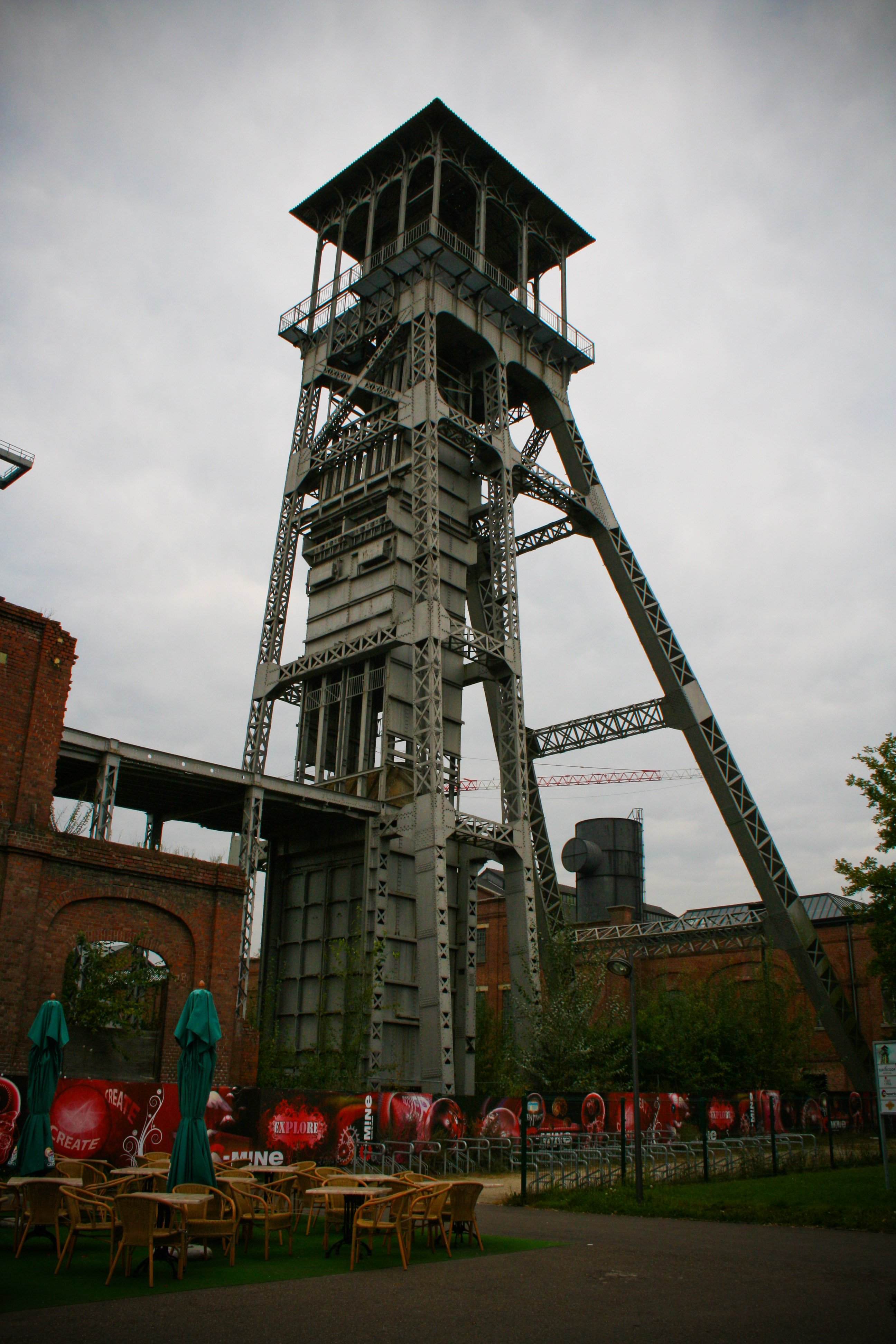 mijnschacht in Genk.